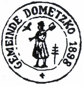 Dometzko - Domecko. Pieczęć gminna